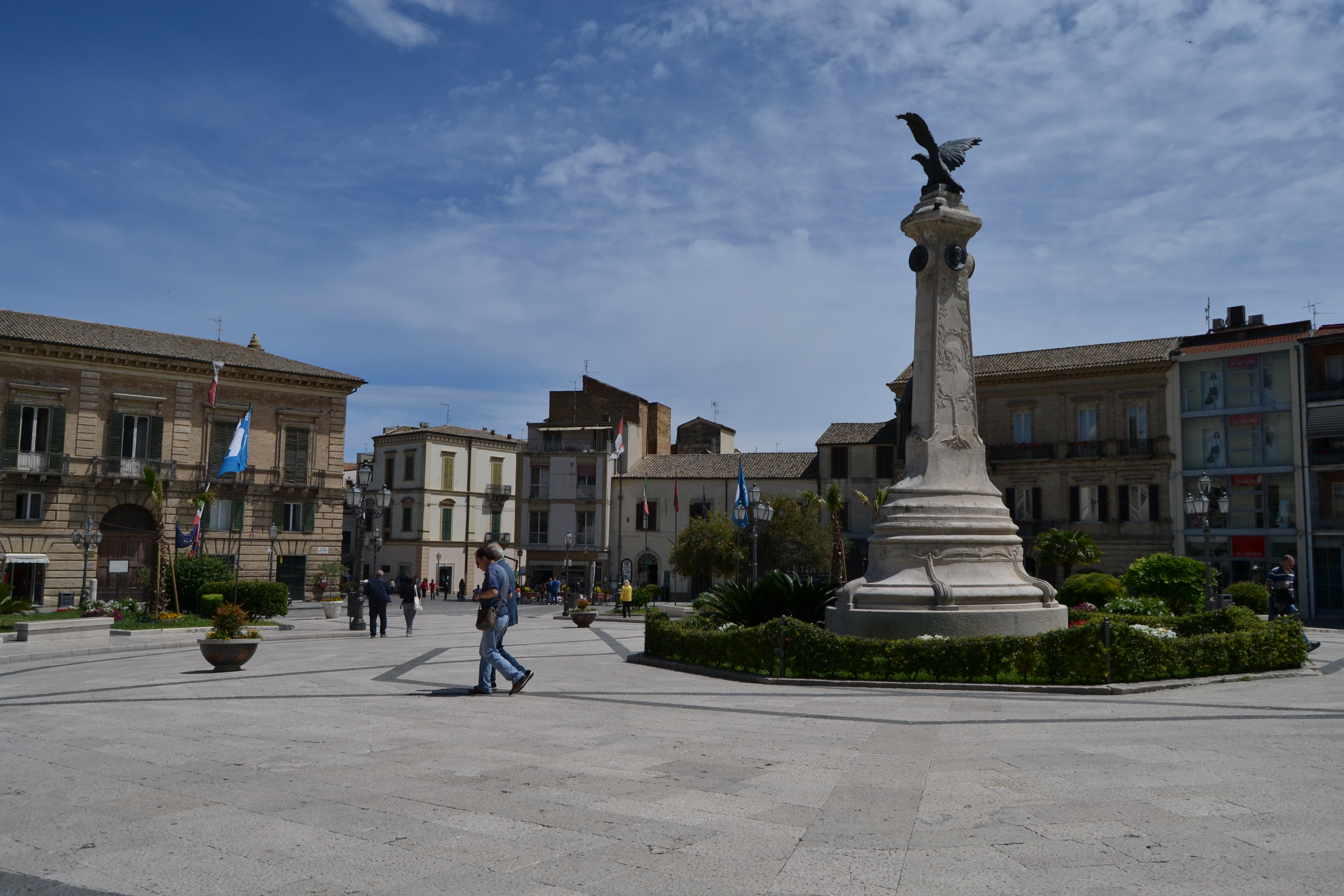 Monumento a Gabriele Rossetti This is a photo of a monument which is part of cultural heritage of Italy.